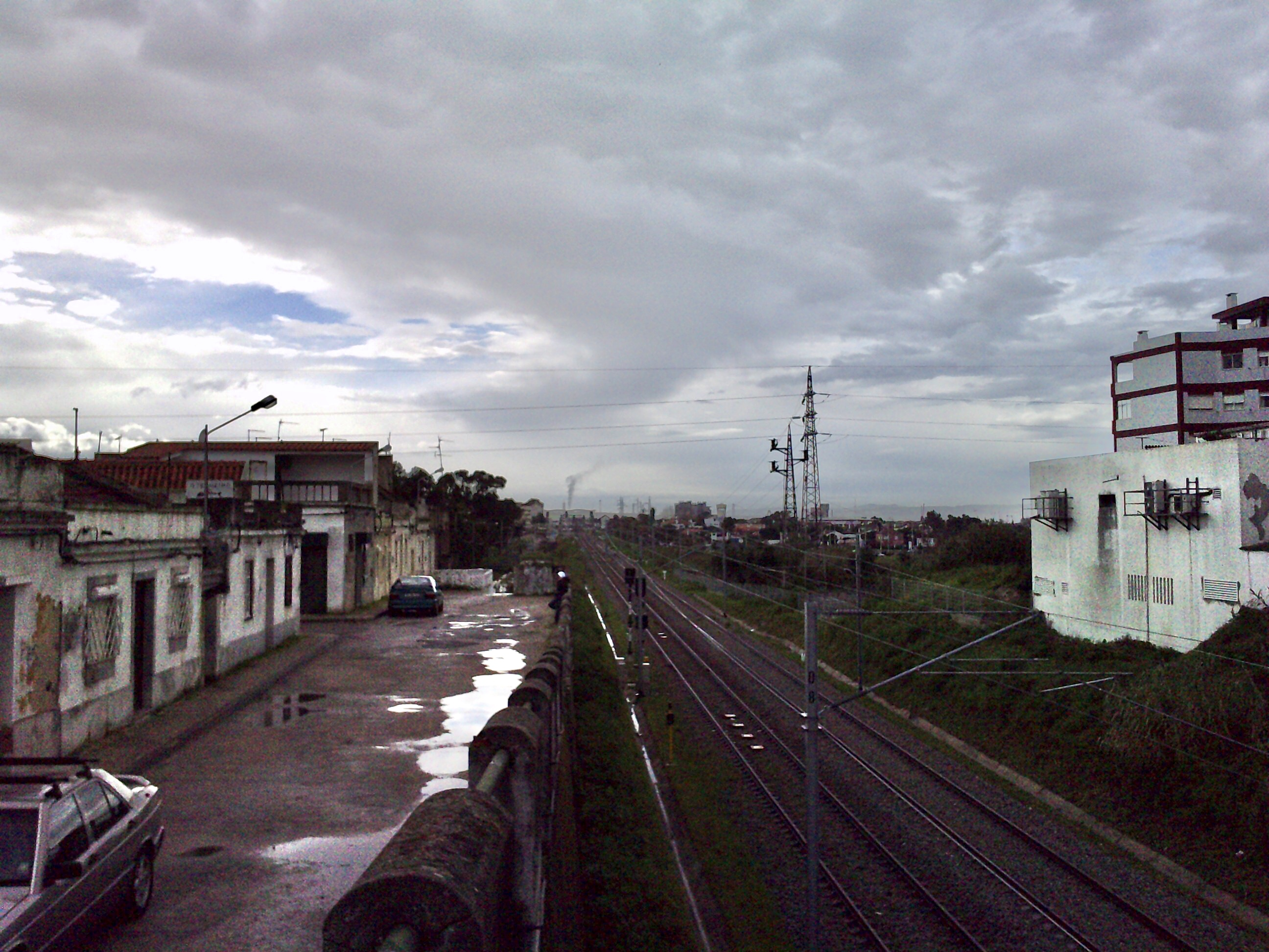 2835 Baixa da Banheira, Portugal